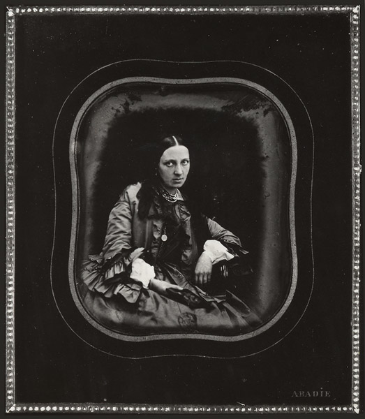 Евдокия Васильевна Сухово-Кобылина (1819 — 1896), сестра драматурга А.В.Сухово-Кобылина, жена М.Ф.Петрово-Соловово.